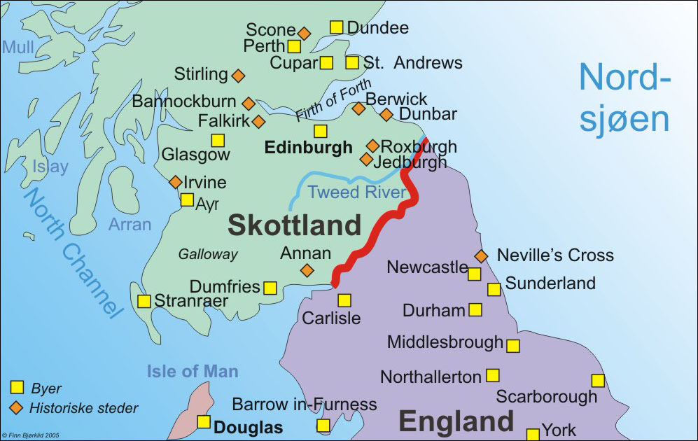 Kart over Skottland, sentrale del med historiske steder. Original tegnet i CorelDraw. Fil tilgjengelig for Wikipediere ved forespørsel.